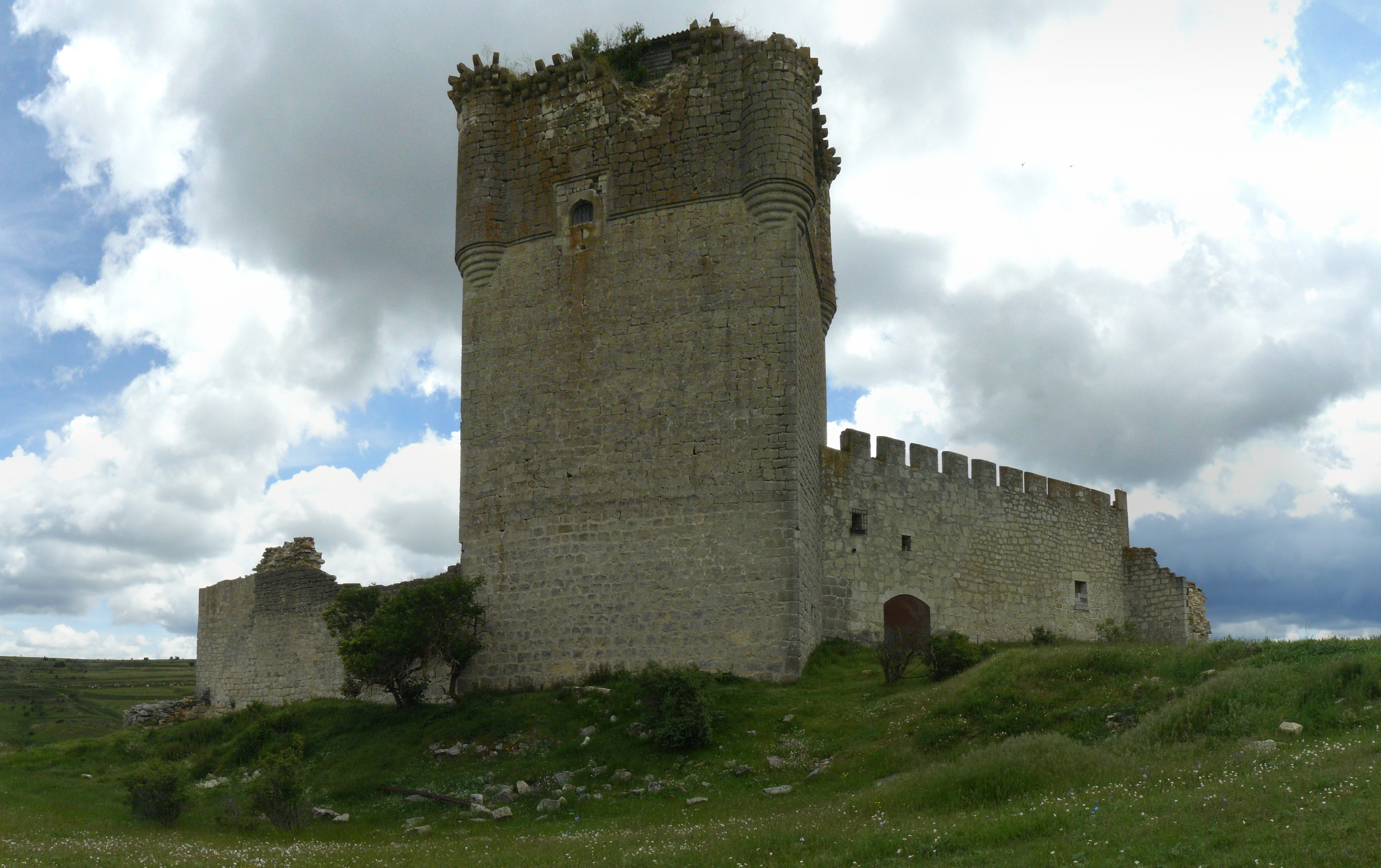 Castillo de Galve de Sorbe, Guadalajara.